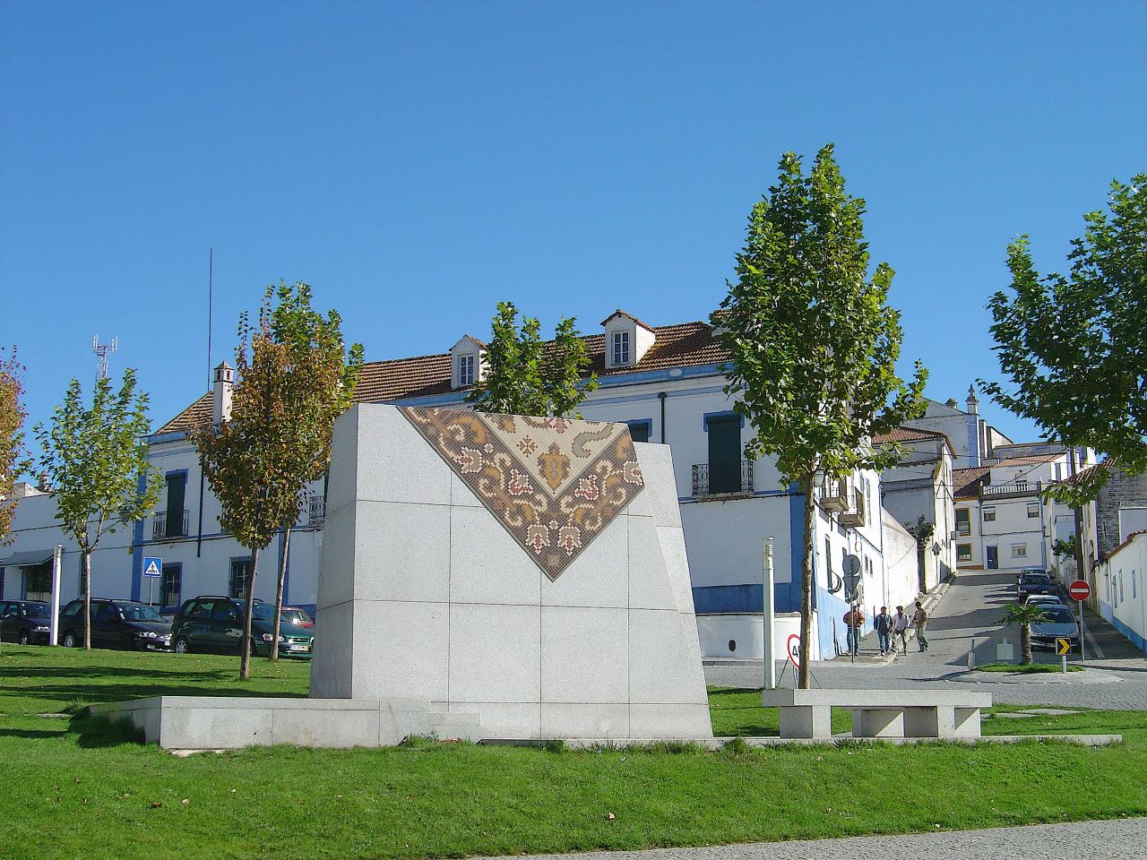 Arraiolos (Portugal)